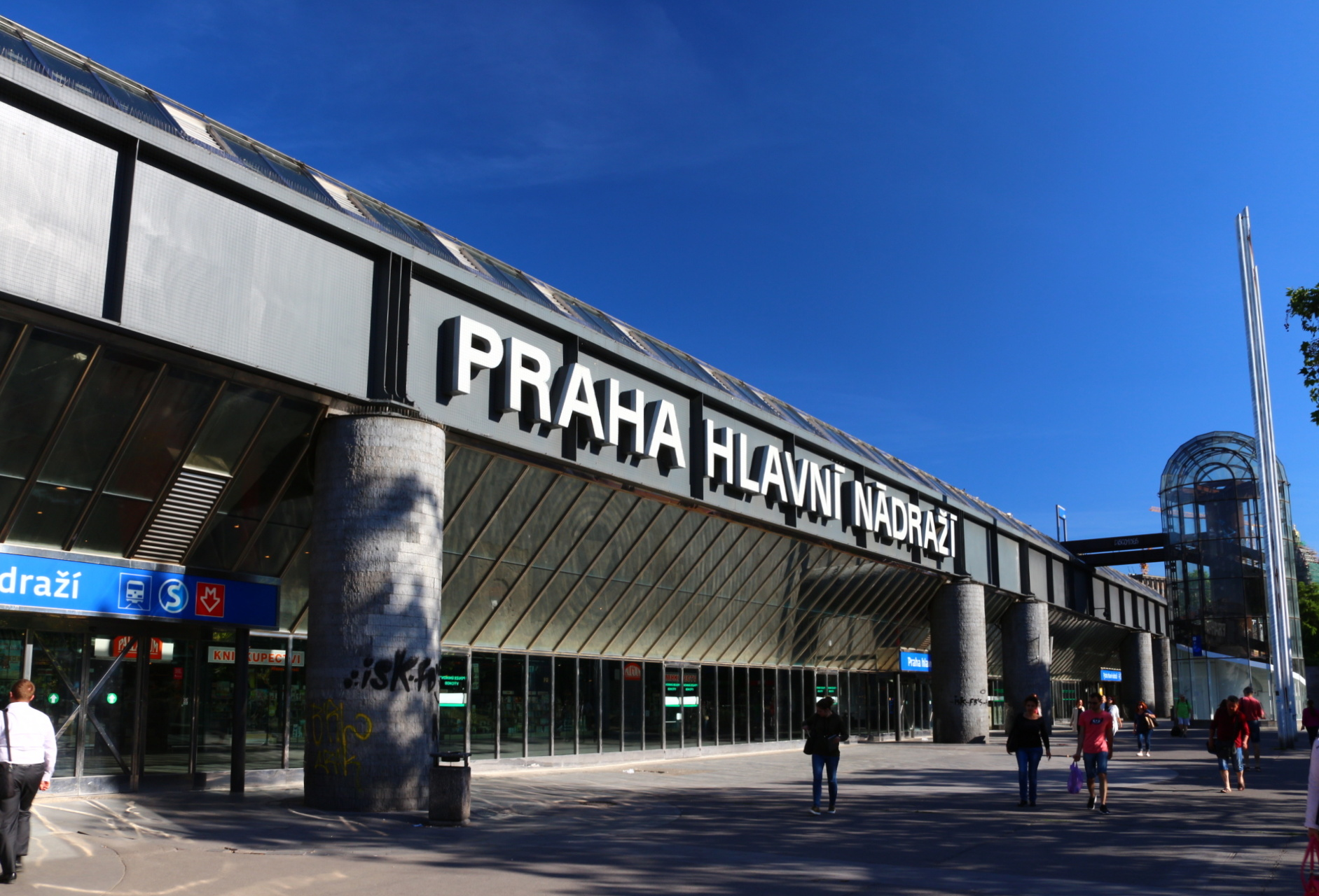 Praha hlavní vlakové nádraží, nová budova